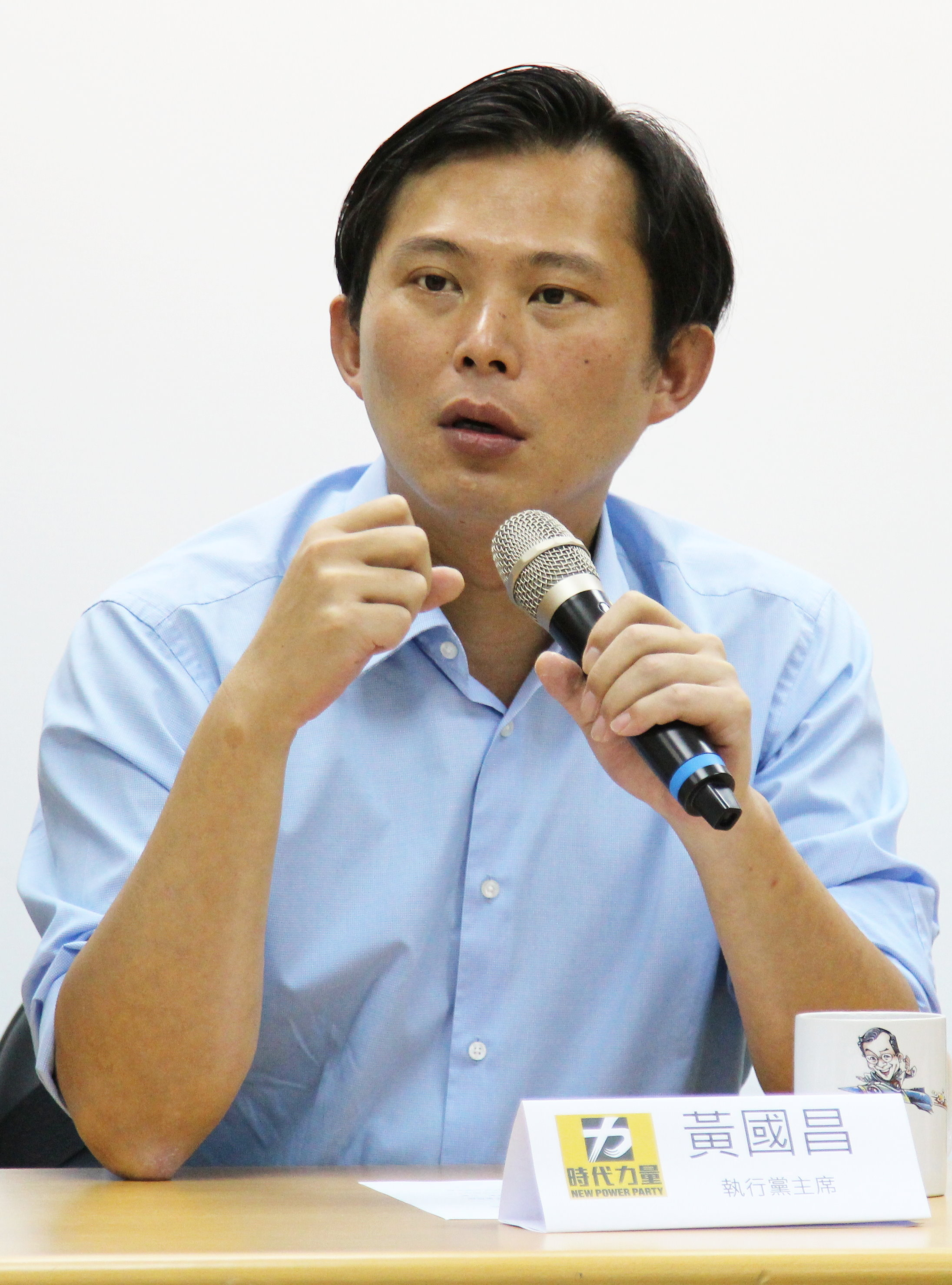 20170408 「與主席有約」時代力量新竹支持者見面會